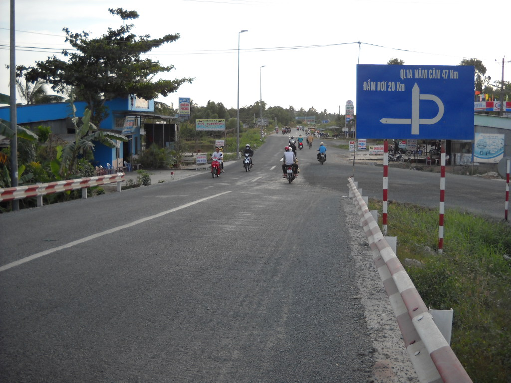 ==Quốc lộ 1A, Cà Mau đi Năm Căn